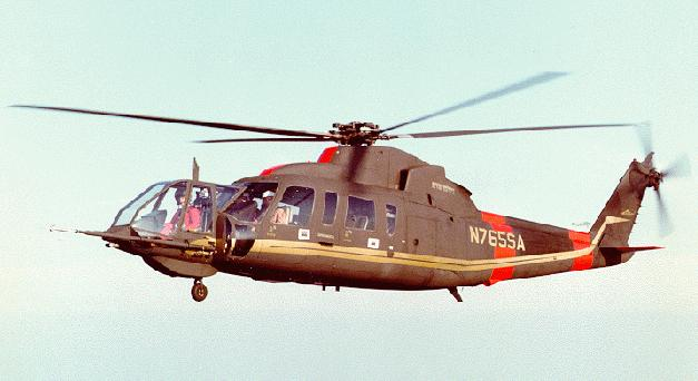 Boeing-Sikorsky S-76 SHADOW